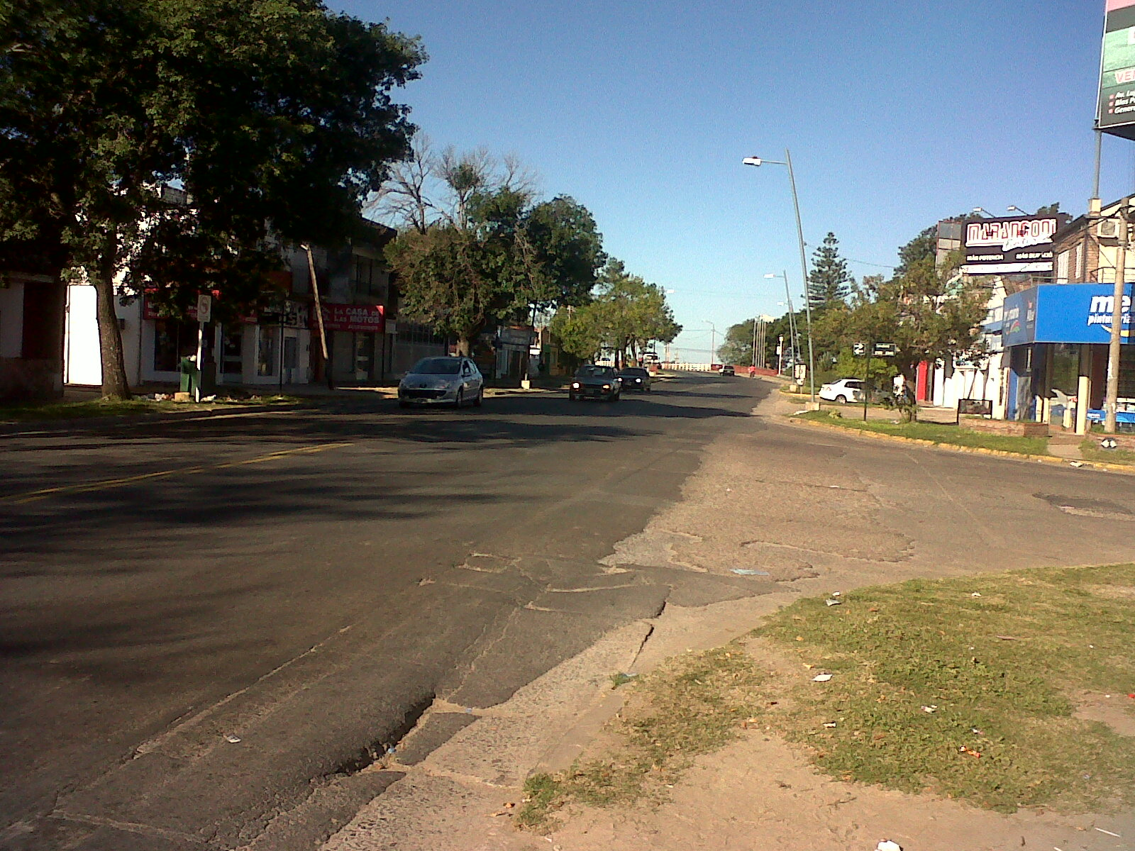 Avenida 7 de Marzo de la ciudad de Santo Tomé, Santa Fe, en el comienzo del Puente Carretero que la une a Santa Fe